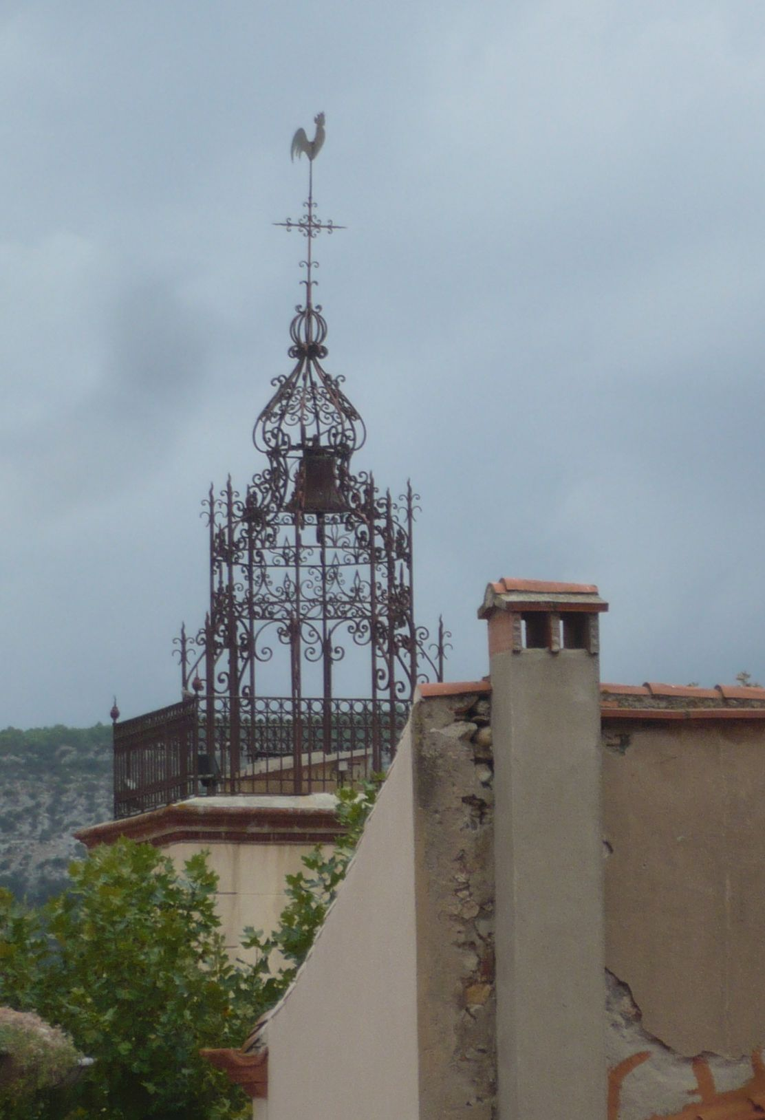 Clocher et cage en fer forgé de l'église Saint-Génis de Tautavel